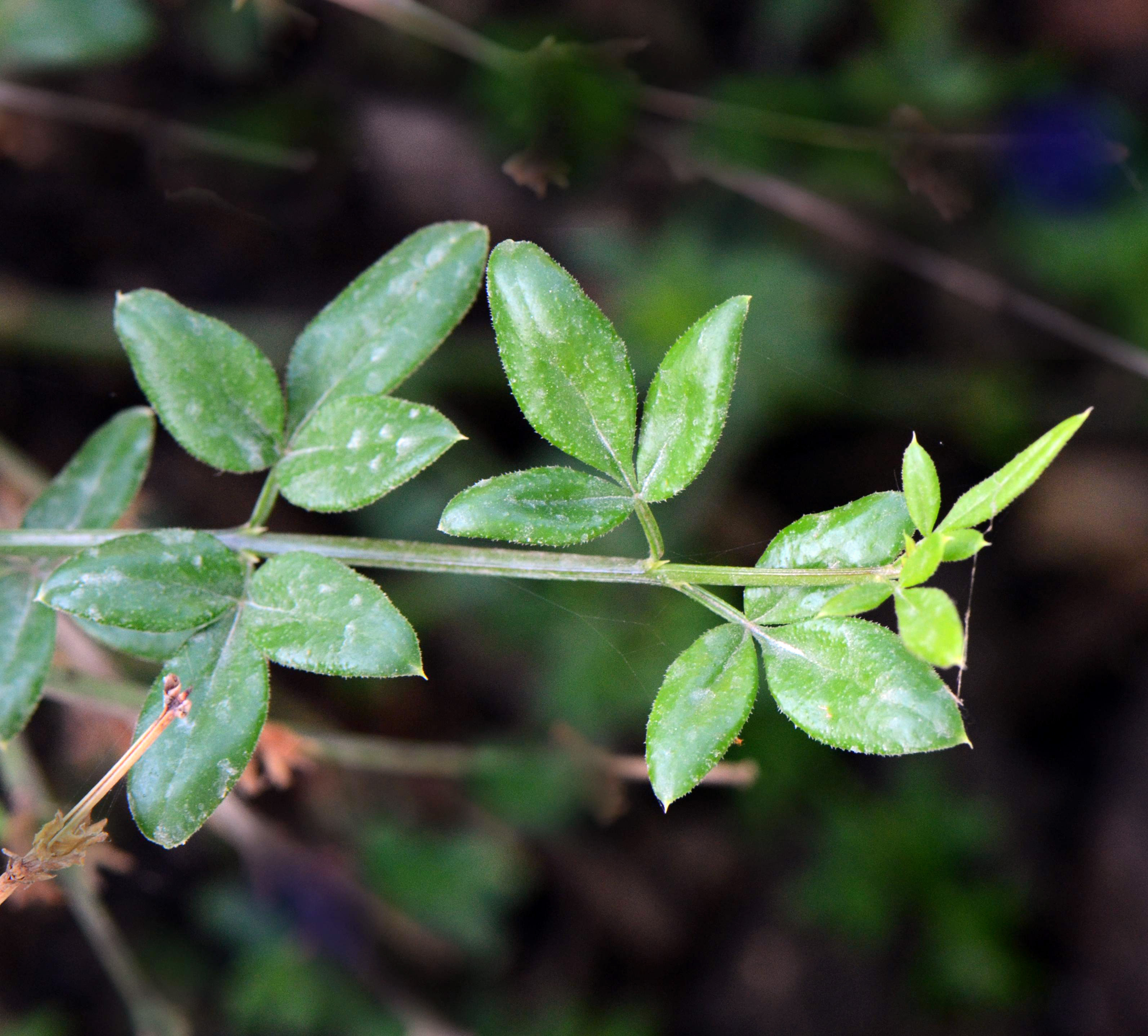 jasminum nodiflorum, feuille trifoliolée